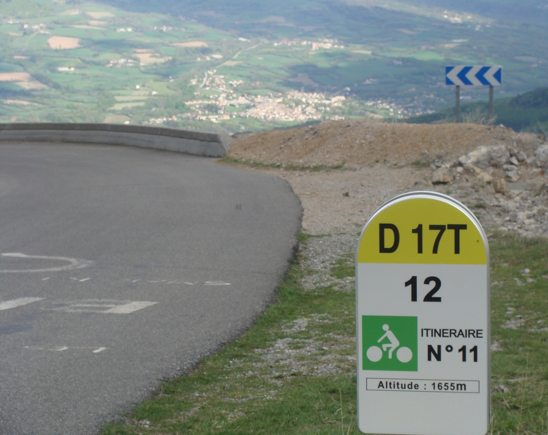 Col du Noyer, départ de la descente vers Saint-Bonnet